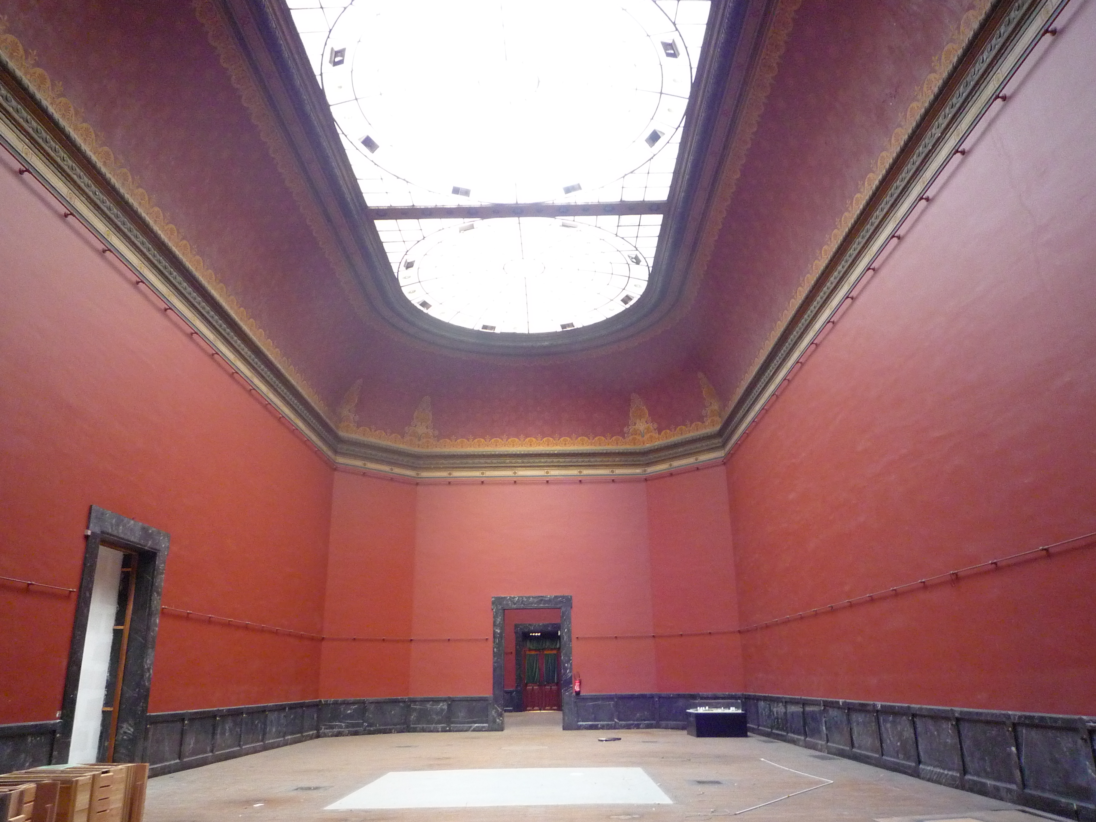 Ancienne salle centrale de peinture dans le musée-bibliothèque de Grenoble (1872). Actuellement sans attribution particulière.